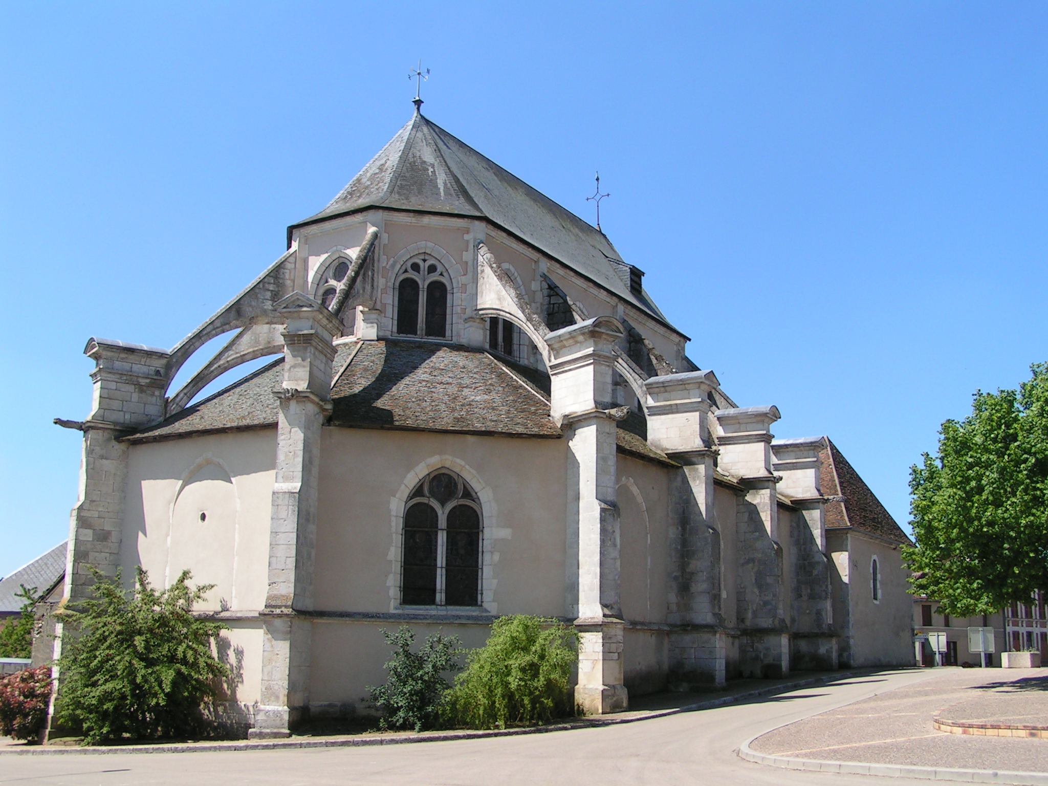 L'église Saint Germain vue de la place du village